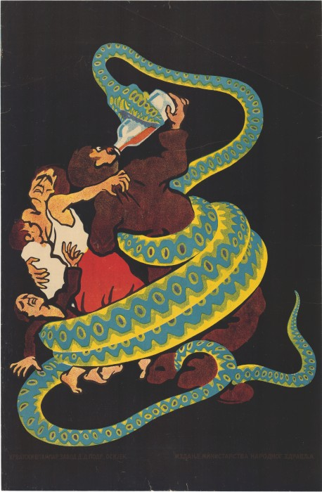 Plakat za boj proti alkoholizmu